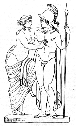 Greek God Ares